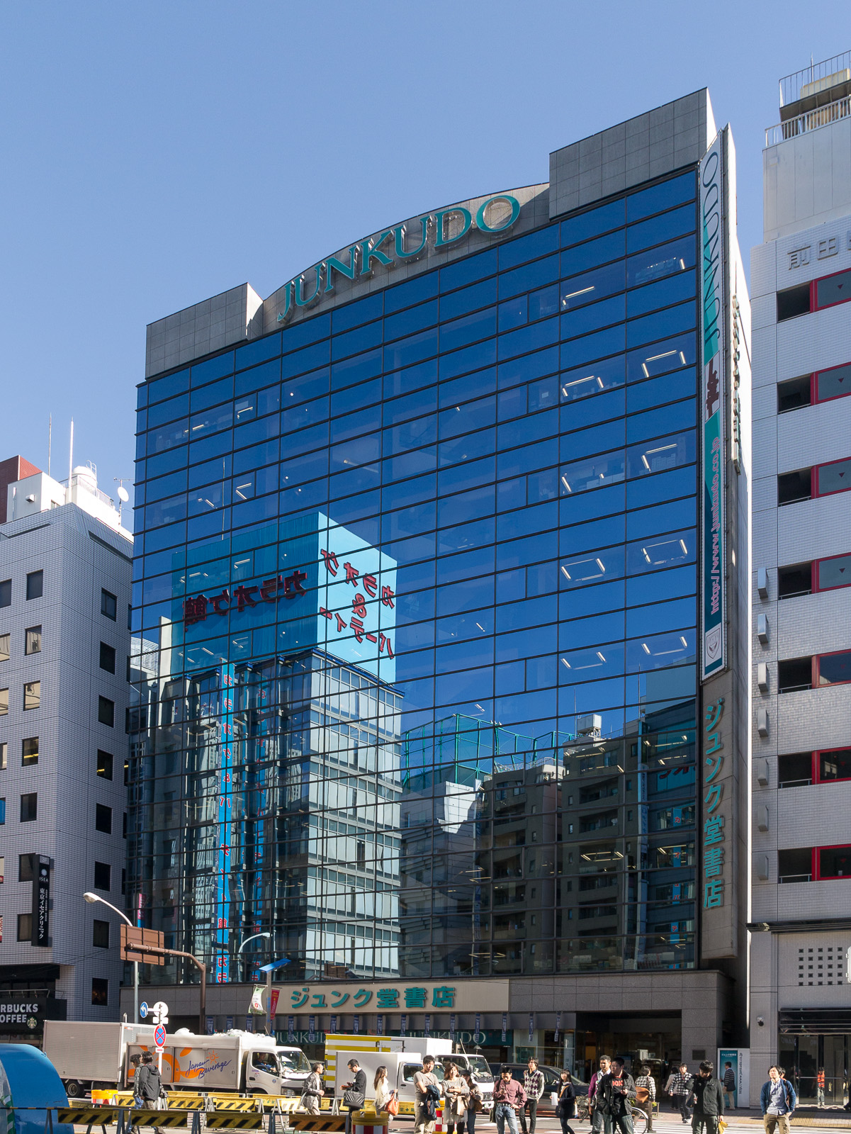 ジュンク堂書店池袋店、東京都豊島区南池袋2-15-5。